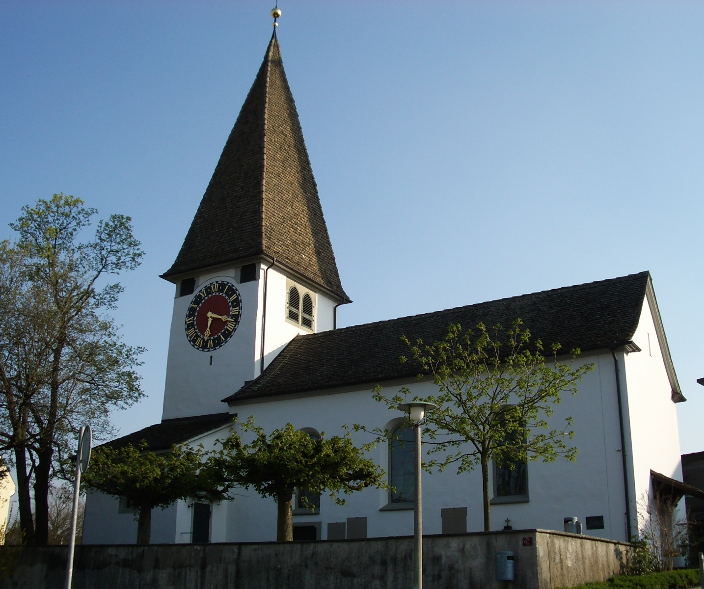 Zürich-Altstetten, Switzerland self-made, April 2006